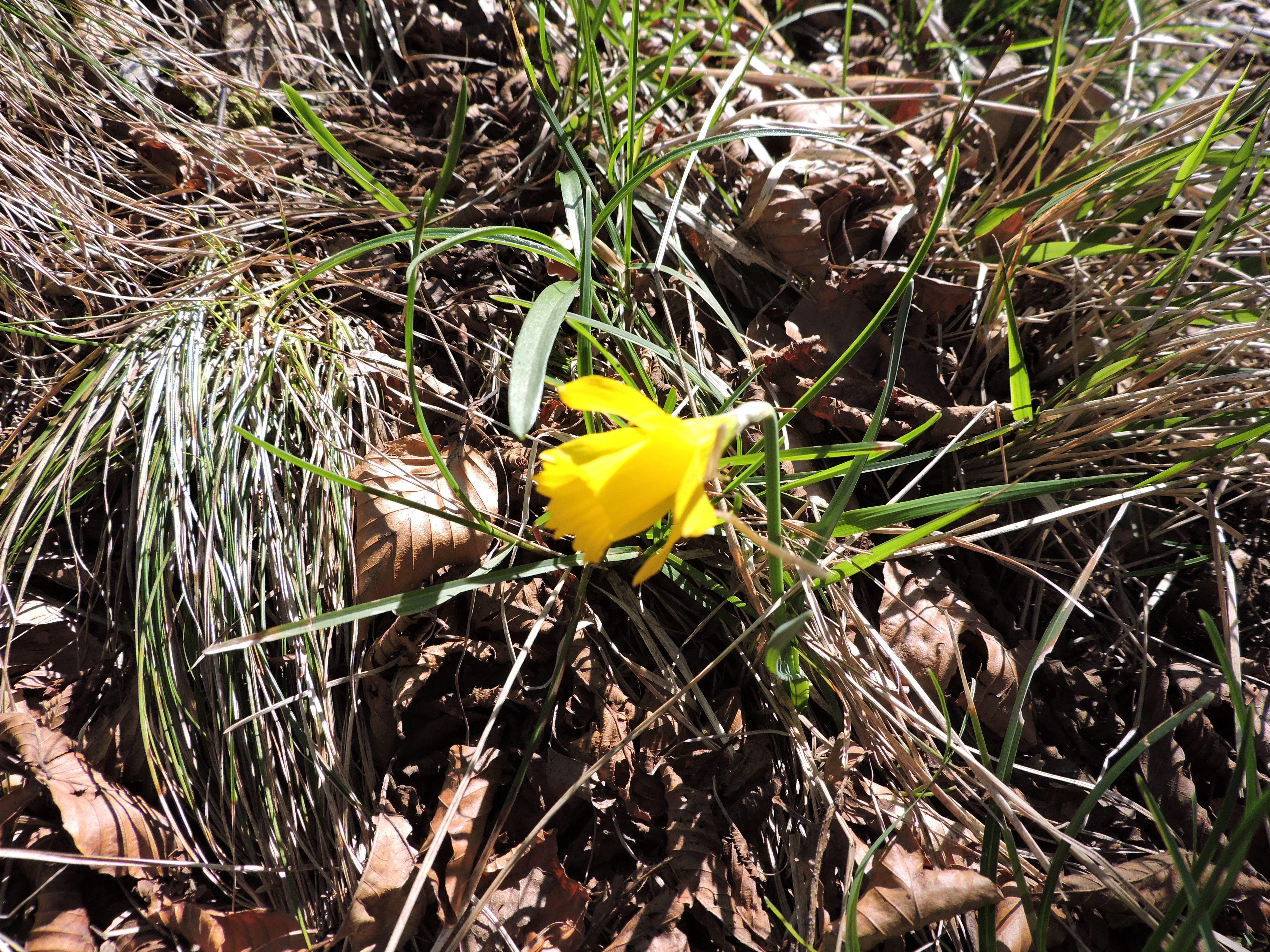 Monte Ravinet - Rocca Barbena (Q49961672) Tromboncino giallo (Narcissus pseudonarcissus) presso la Rocca Barbena